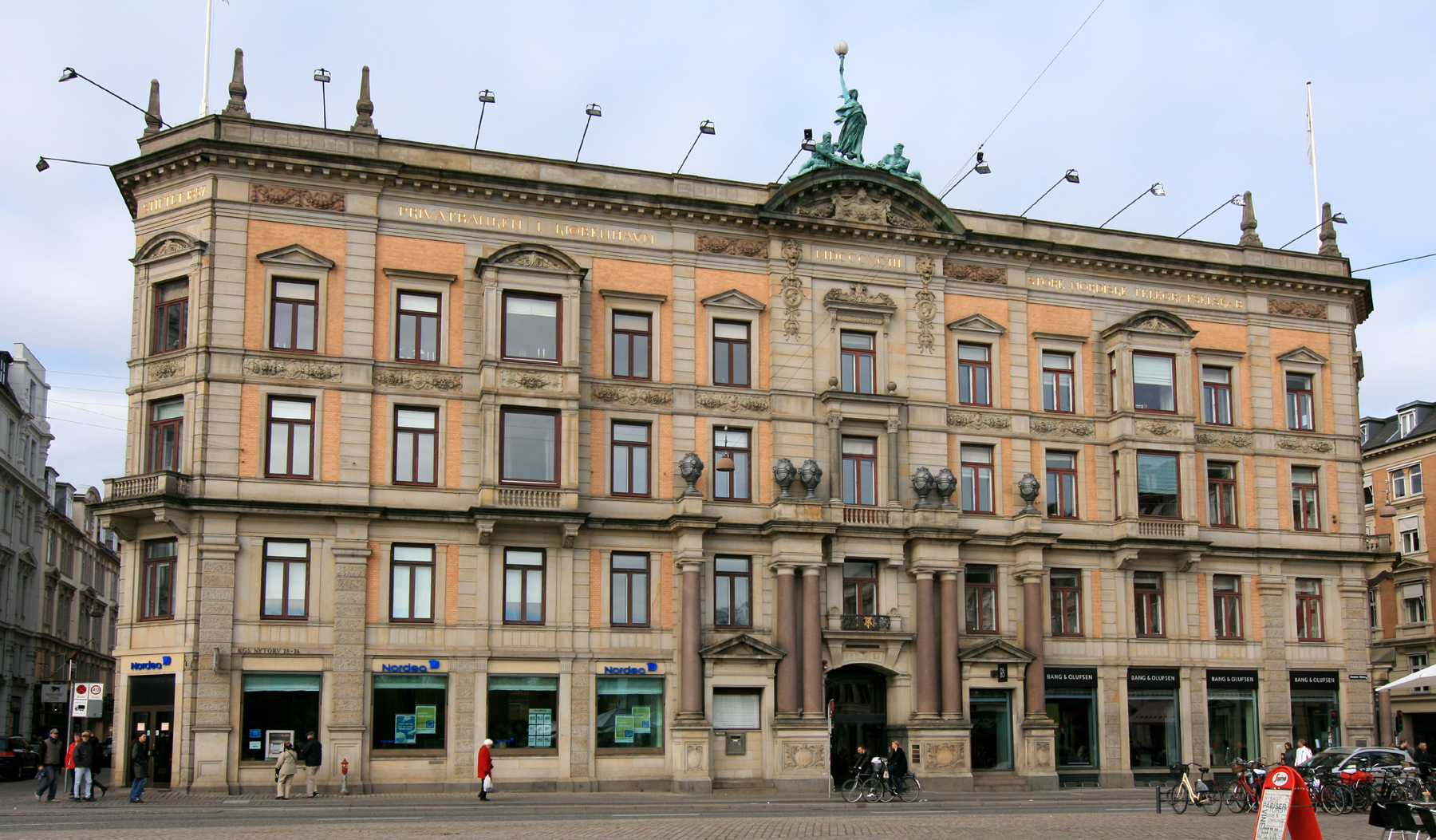 Kongens Nytorv 26. København. Bygget 1893. Frem til 2003 hovedsæde for Det Store Nordiske Telegraf-Selskab og GN Store Nord.